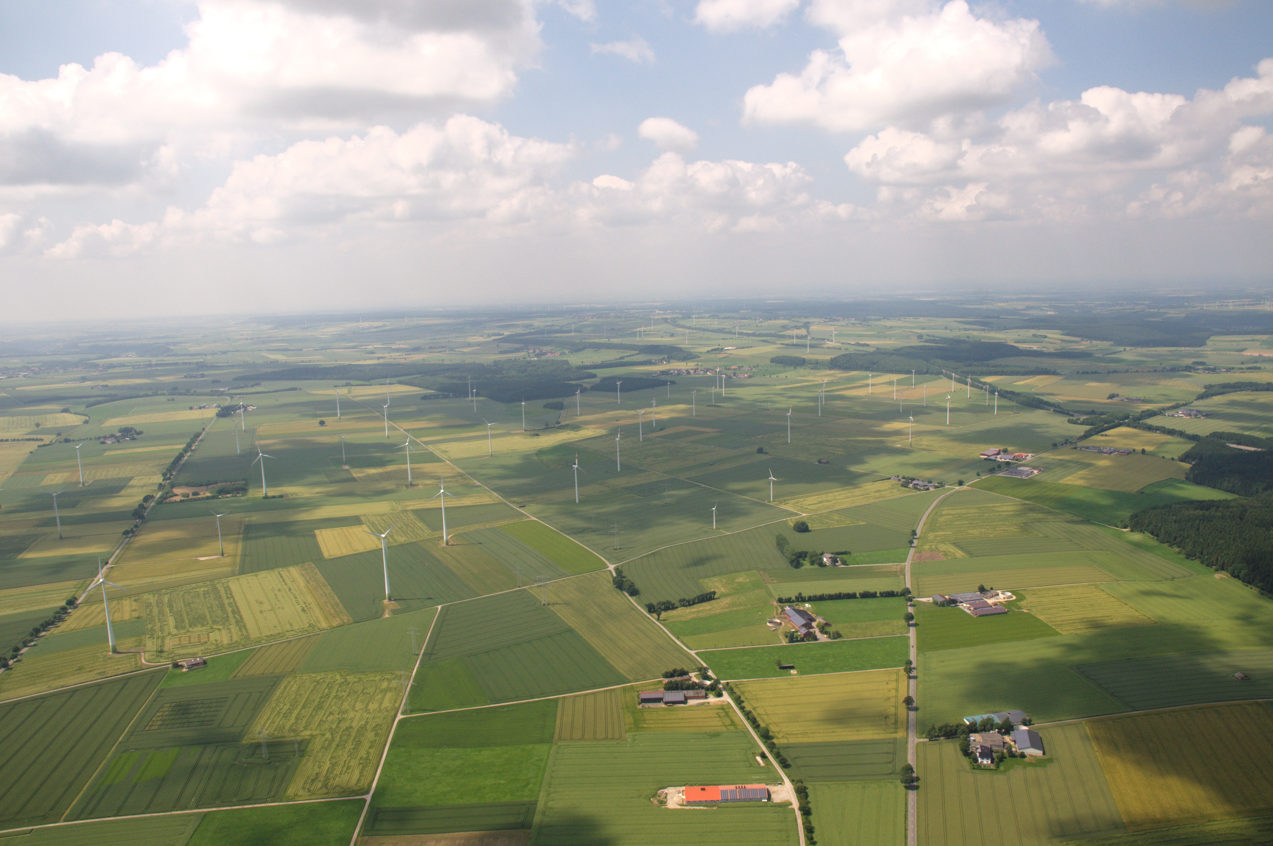 Fotoflug Sauerland-Ost: Windkraftanlagenpark Sintfeld westlich von Meerhof, L636, L817, Bundesautobahn 44; Blickrichtung Westen.